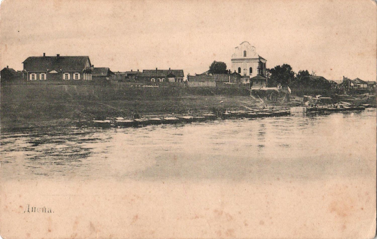 Беларуская (тарашкевіца): Дзісна (Dzisna), рака Дзьвіна (Dźvina). Касьцёл пры кляштары францішканаў